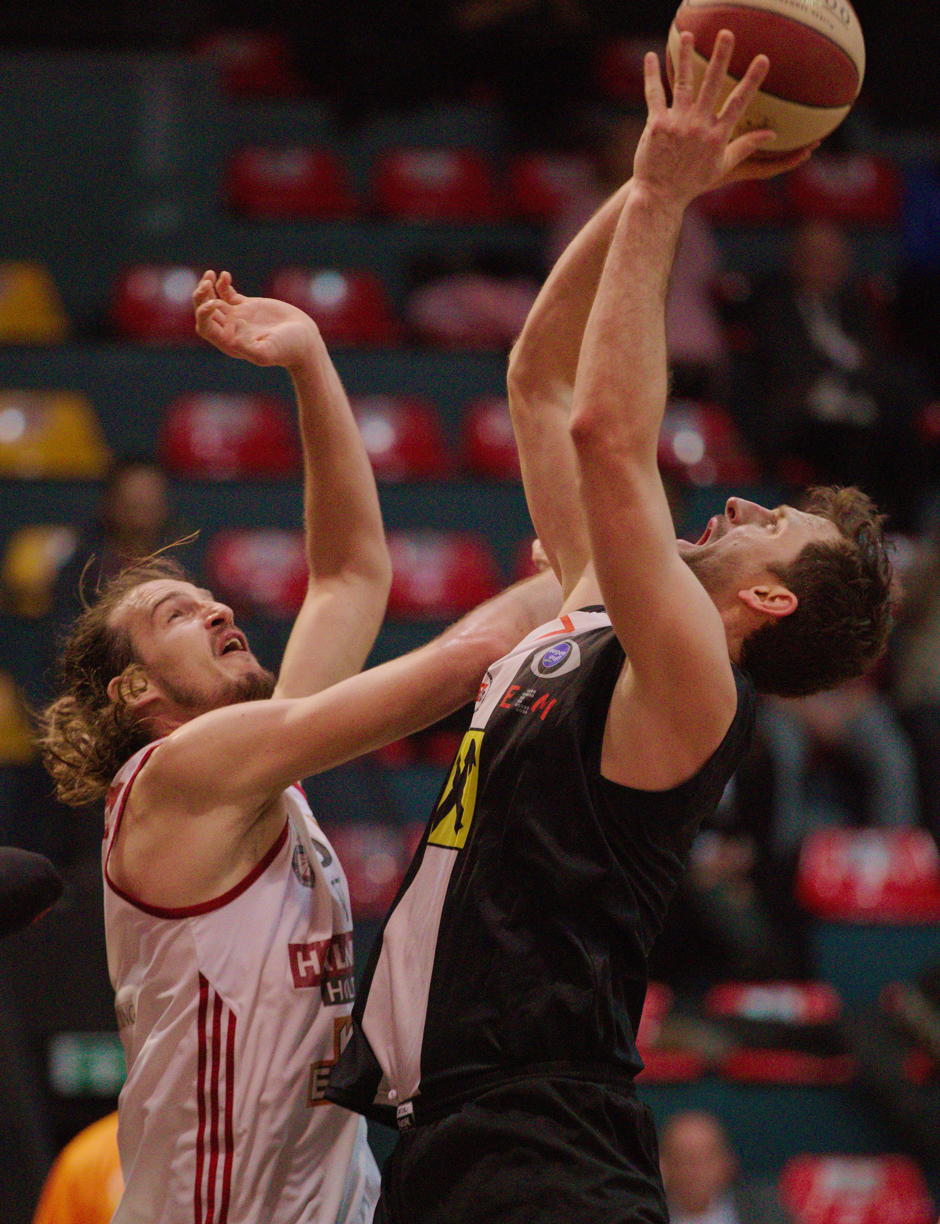 Jiri Hubalek (links), Spieler des BC Hallmann Vienna, verteidigt gegen Davor Lamesic (rechts) beim Basketball-Bundesligaspiel gegen die Raiffeisen Flyers Wels, 21. Jänner 2018